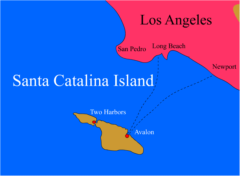 SantaCatalina